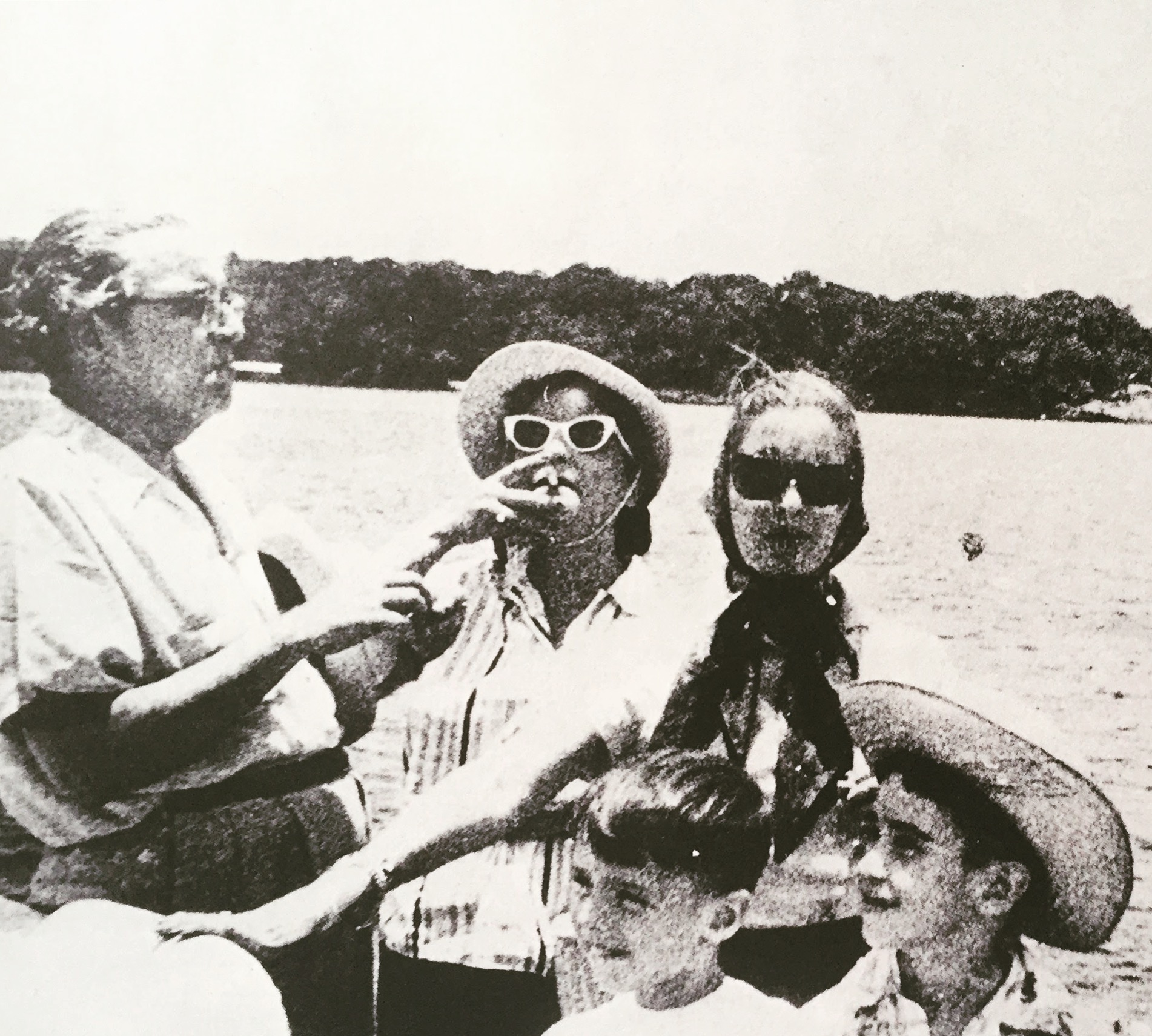 En el río Caroní: Mariano Picón Salas, Juanita de Falcón Briceño, Beatriz de Picón Salas y los niños Marcos Falcón Ascanio y Micky Gómez Bello.